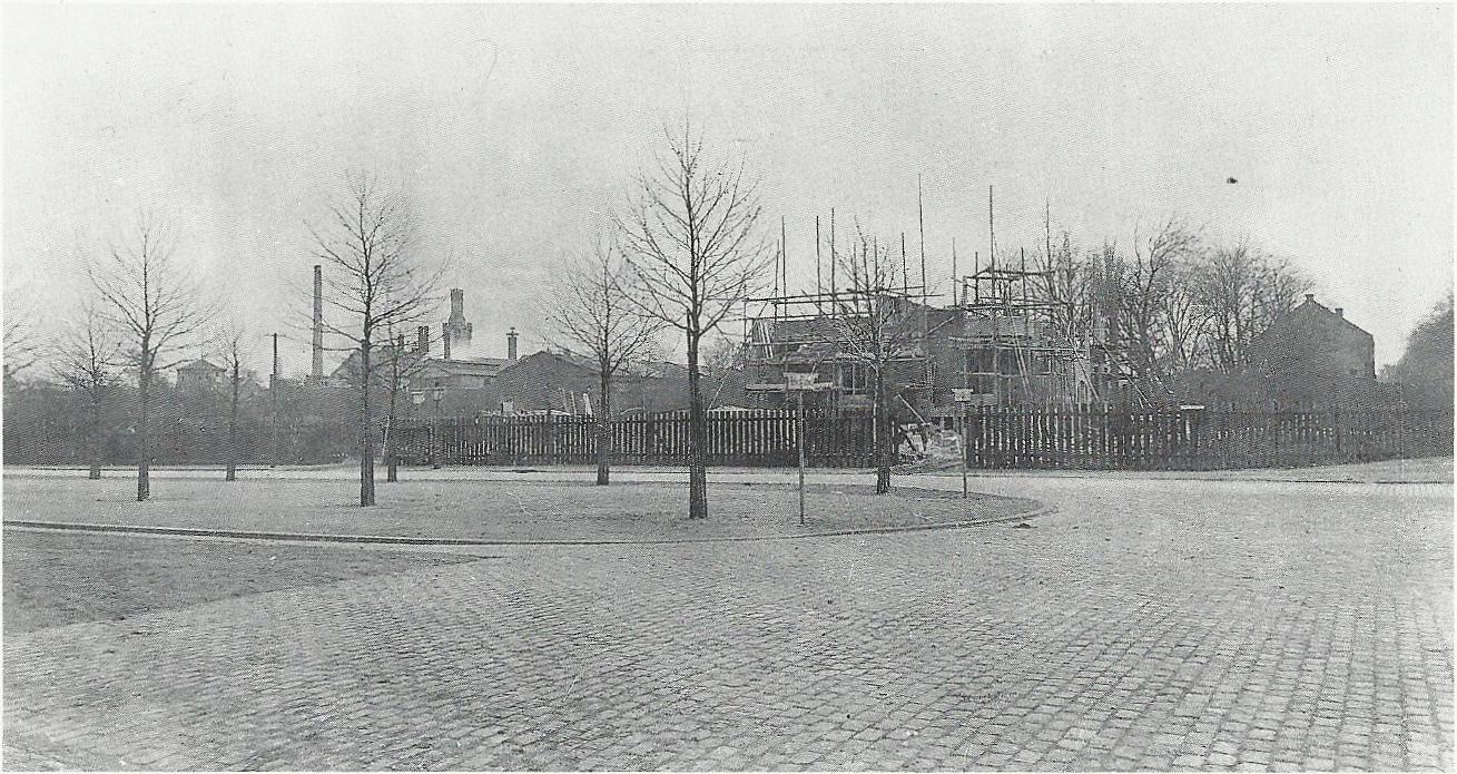 Villa Schröder, Bayenthalgürtel 15, Köln-Marienburg: Aufnahme während der Bauphase